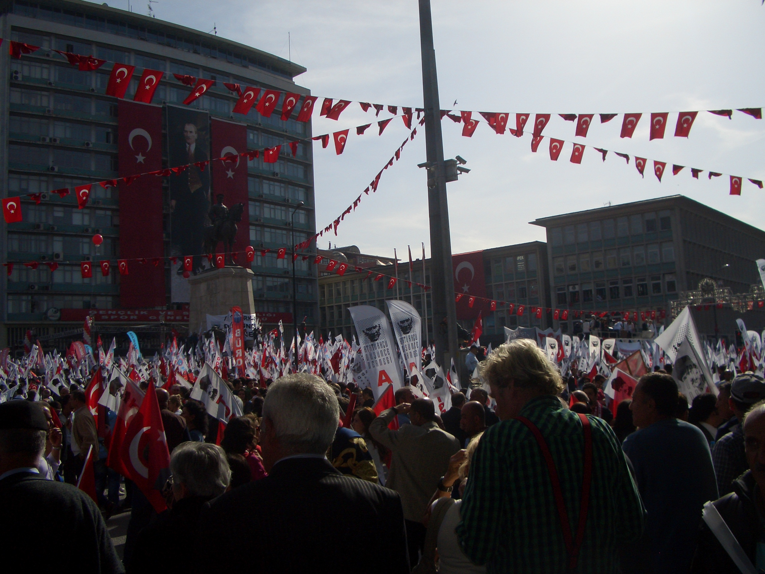 Cumhuriyet için Seferberlik Buluşması